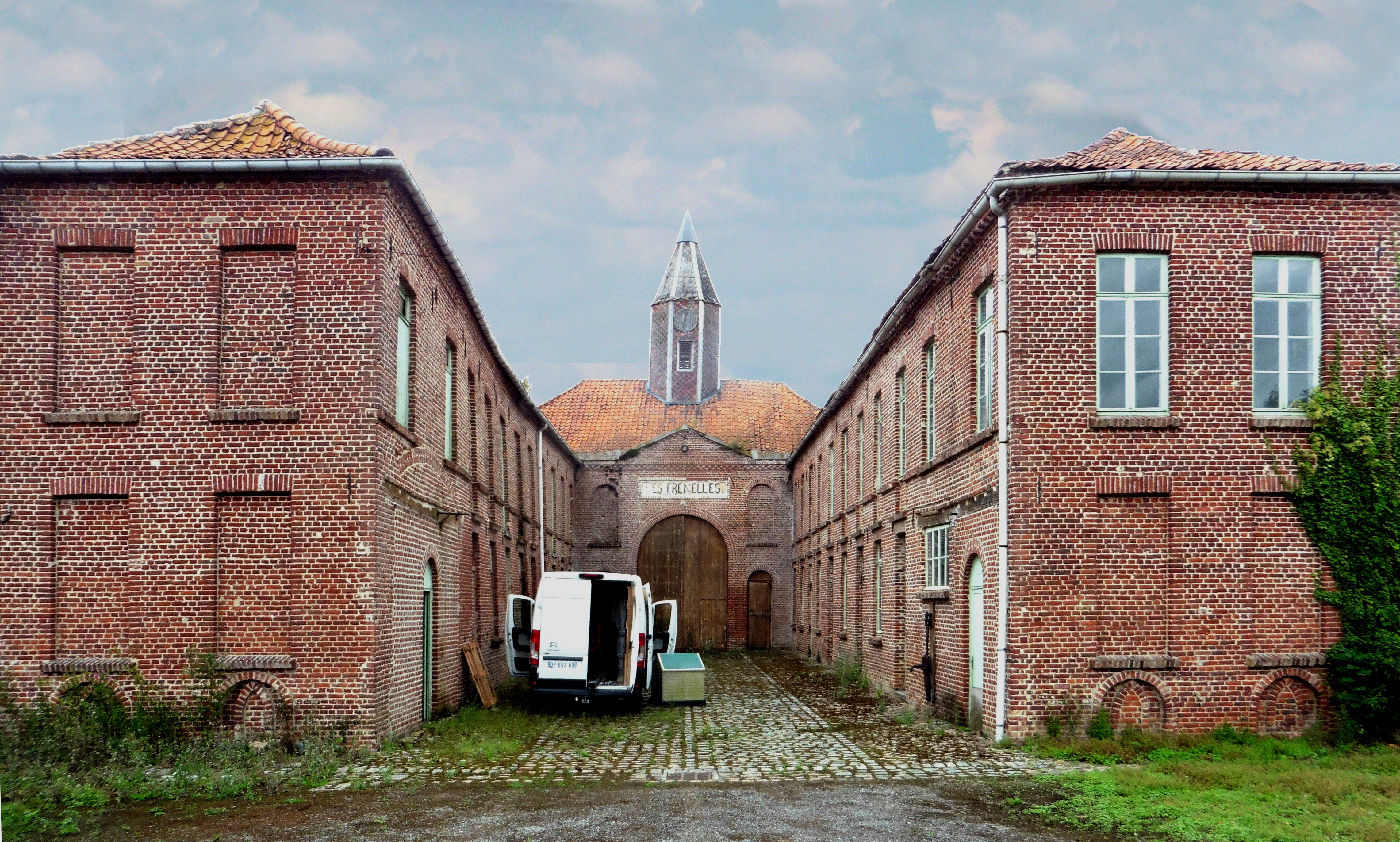 Le Château des Frenelles Bouvignies (Nord) dans le Nord région Nord-Pas-de-Calais France.